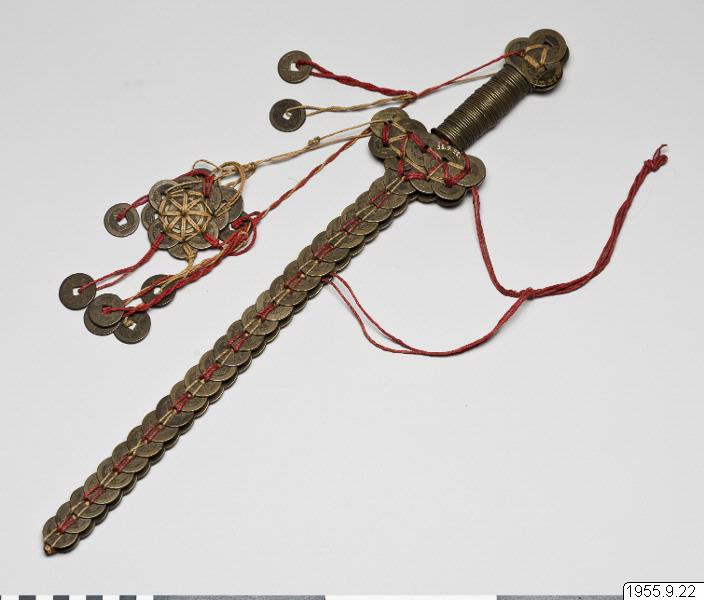 Myntsvärd, mynt hopsatta med röda och gula snören i formen av ett svärd. Från greppet hänger några knippen med mynt.